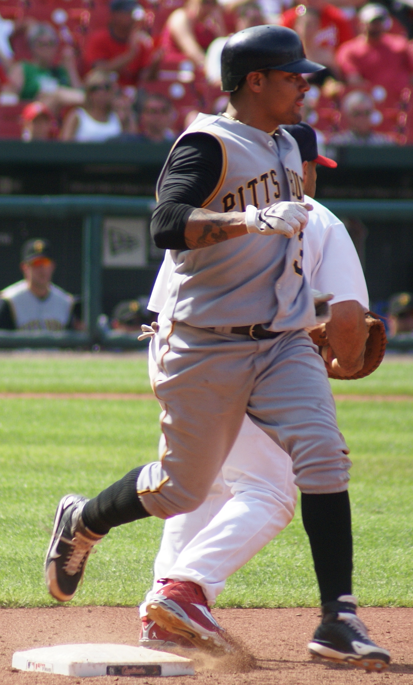 Luis Rivas